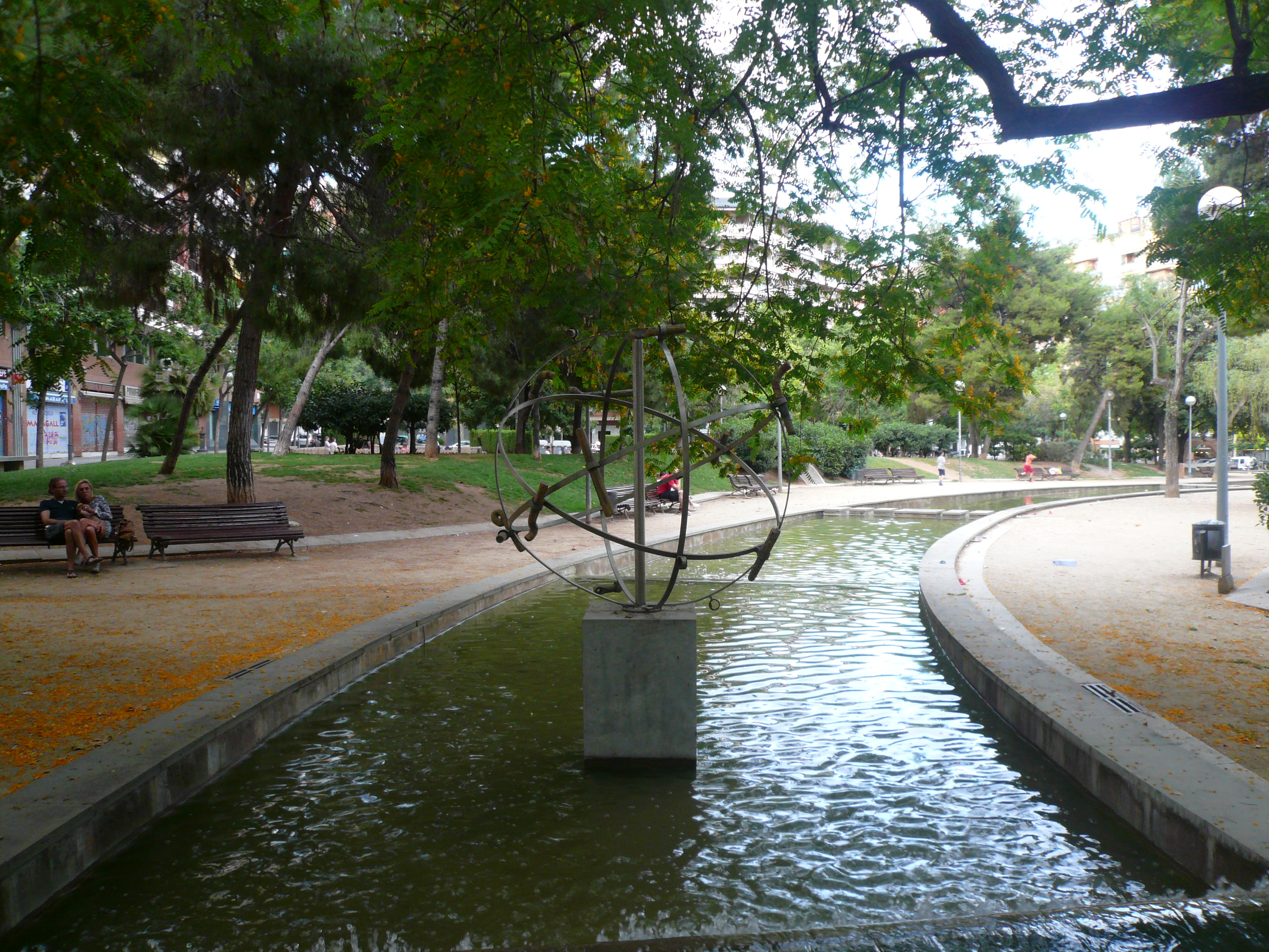 Euclidiana, Els quatre elements. Pl. de les Corts (Barcelona). Escultor: Luis Gueilburt, signada. Material: acer inoxidable i peces ceràmiques sobre base de pedra calcària. 1989, en l'actual emplaçament des de 1996. 68″ N, 2° 08′ 10.14″ E